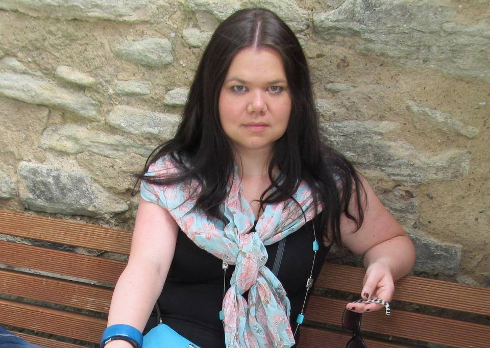 Kunsthistorička Kornélia Kolářová Takácsová.